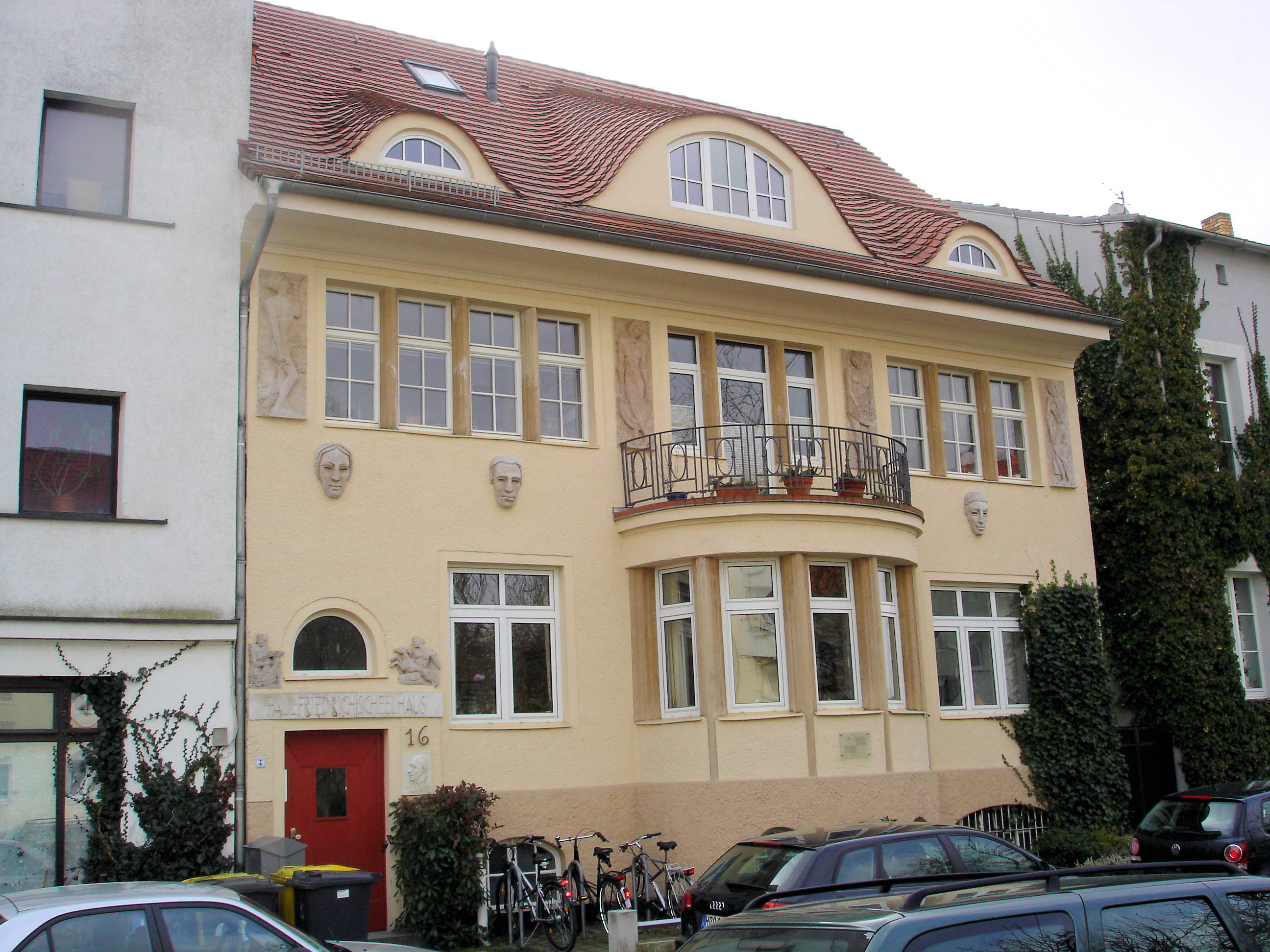 Wohnhaus von Paul Friedrich Scheel in Rostock, Augustenstraße 16, Reliefs nach 1916 von Margarete Scheel